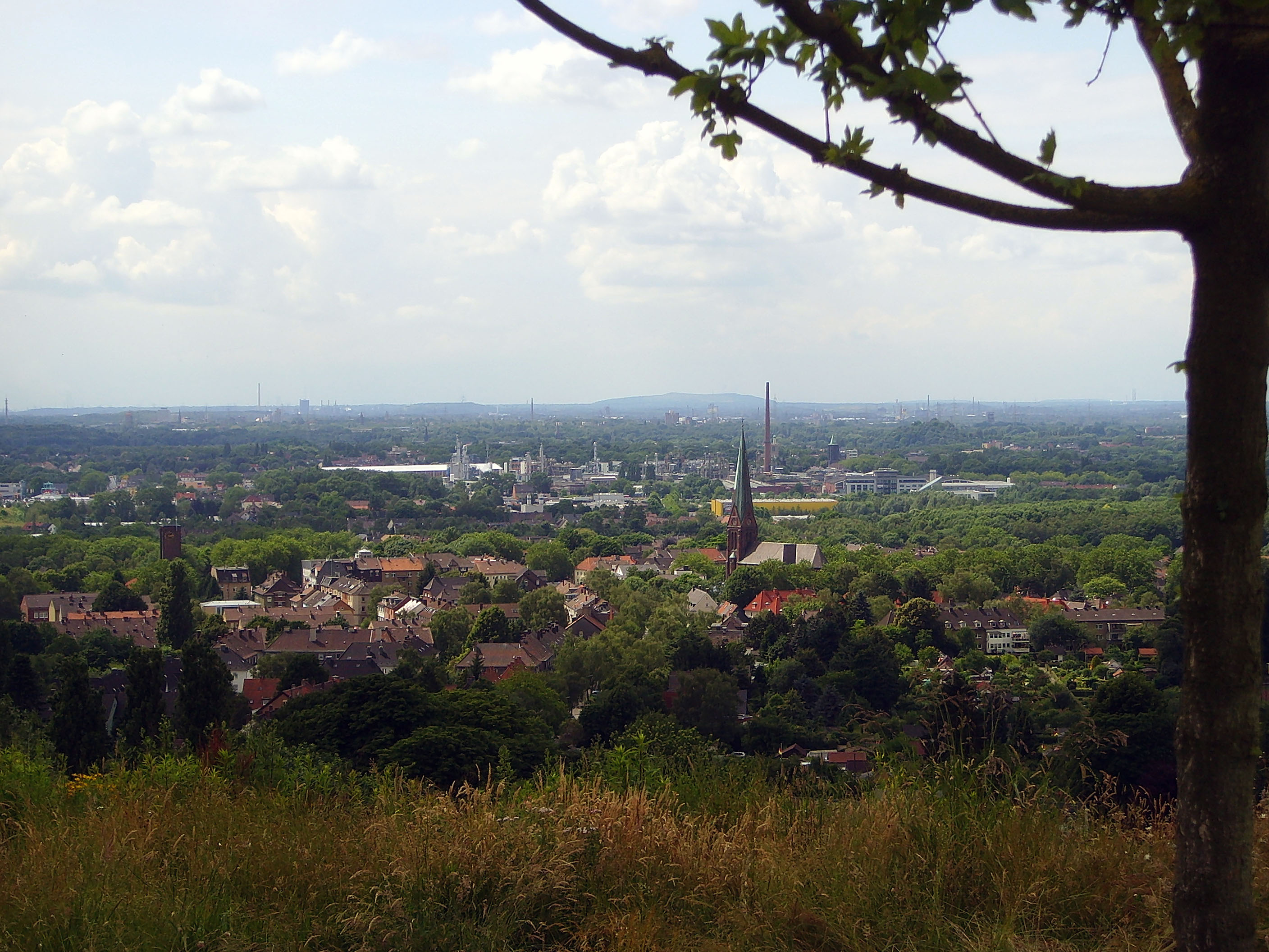 Ansicht von Riemke vom Tippelsberg aus Source: own work Date: June 2008, Bochum, Germany Author: Maschinenjunge Licence: GFDL, cc-by 3.0